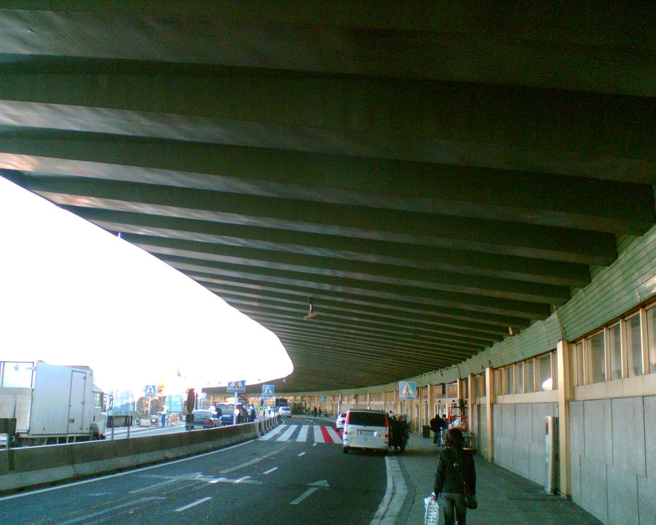 La Terminal 1 (T1) de Barajas